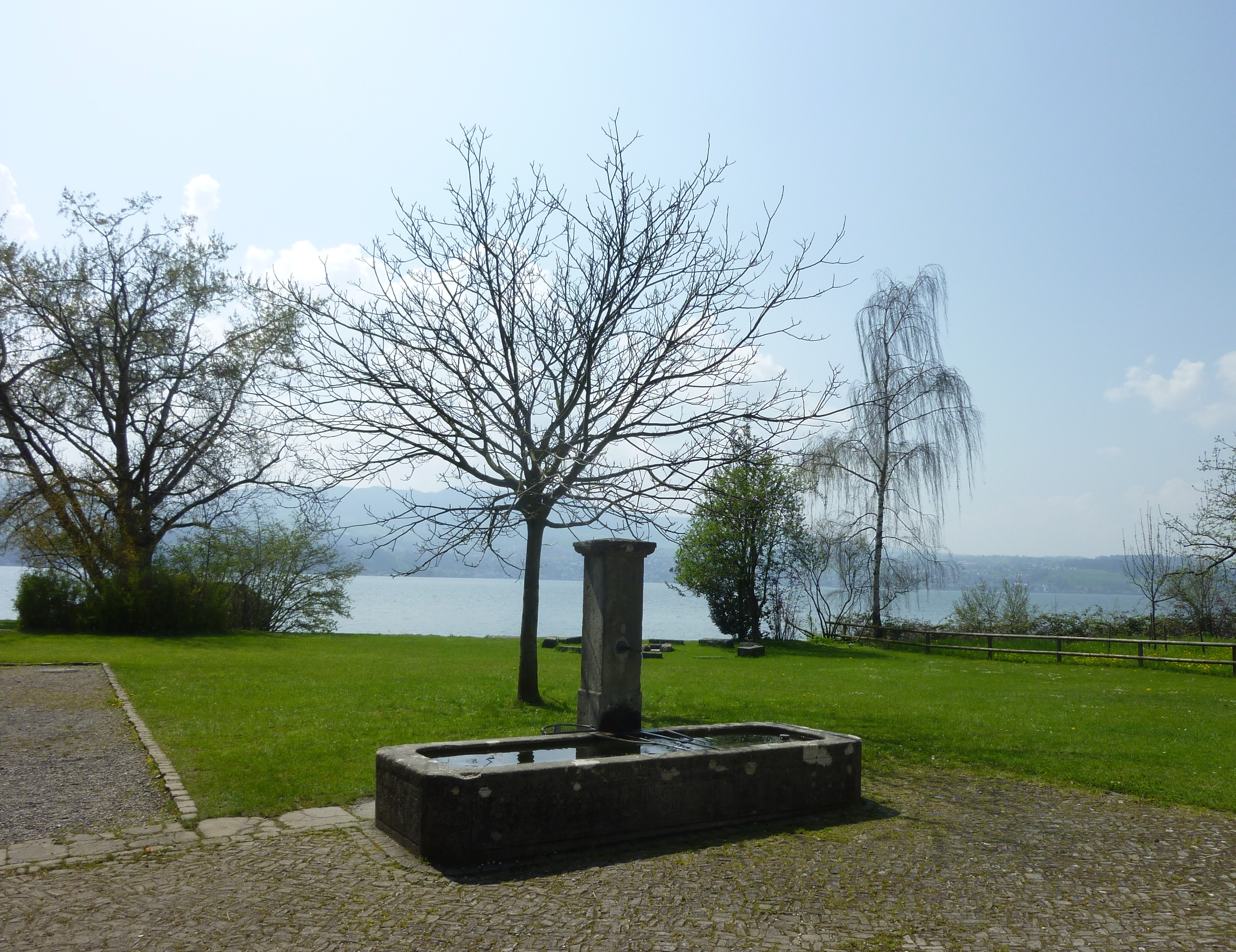 Ritterhaus Uerikon, Park